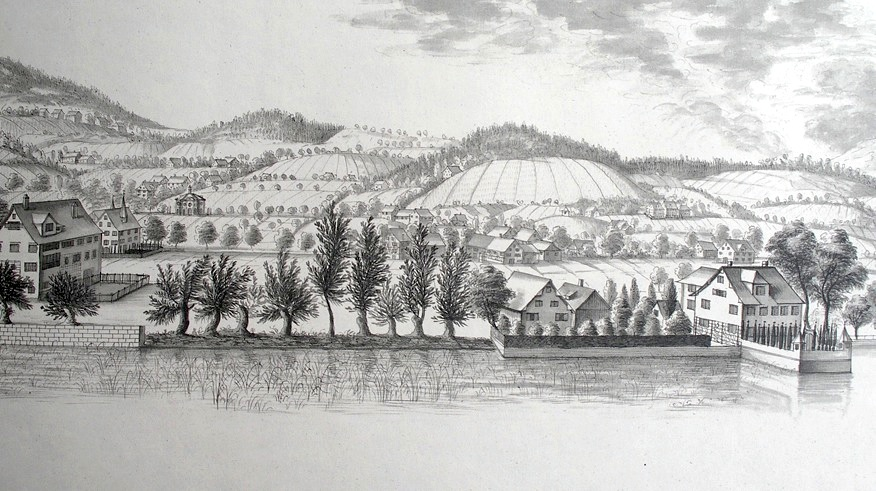 Landhaus 'Solitude'1770 beim Zürichhorn in Zürich ; die «Seeweid» der Turnachkinder im Zürcher Seefeld. Kupferstich von Johann Jakob Hofmann (1730-1772); 1791 bis 1794 herausgegeben vom Verleger Johannes Hofmeister.